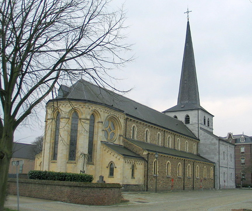 church in Aldeneik - Belgium, my own work (Paul Hermans)